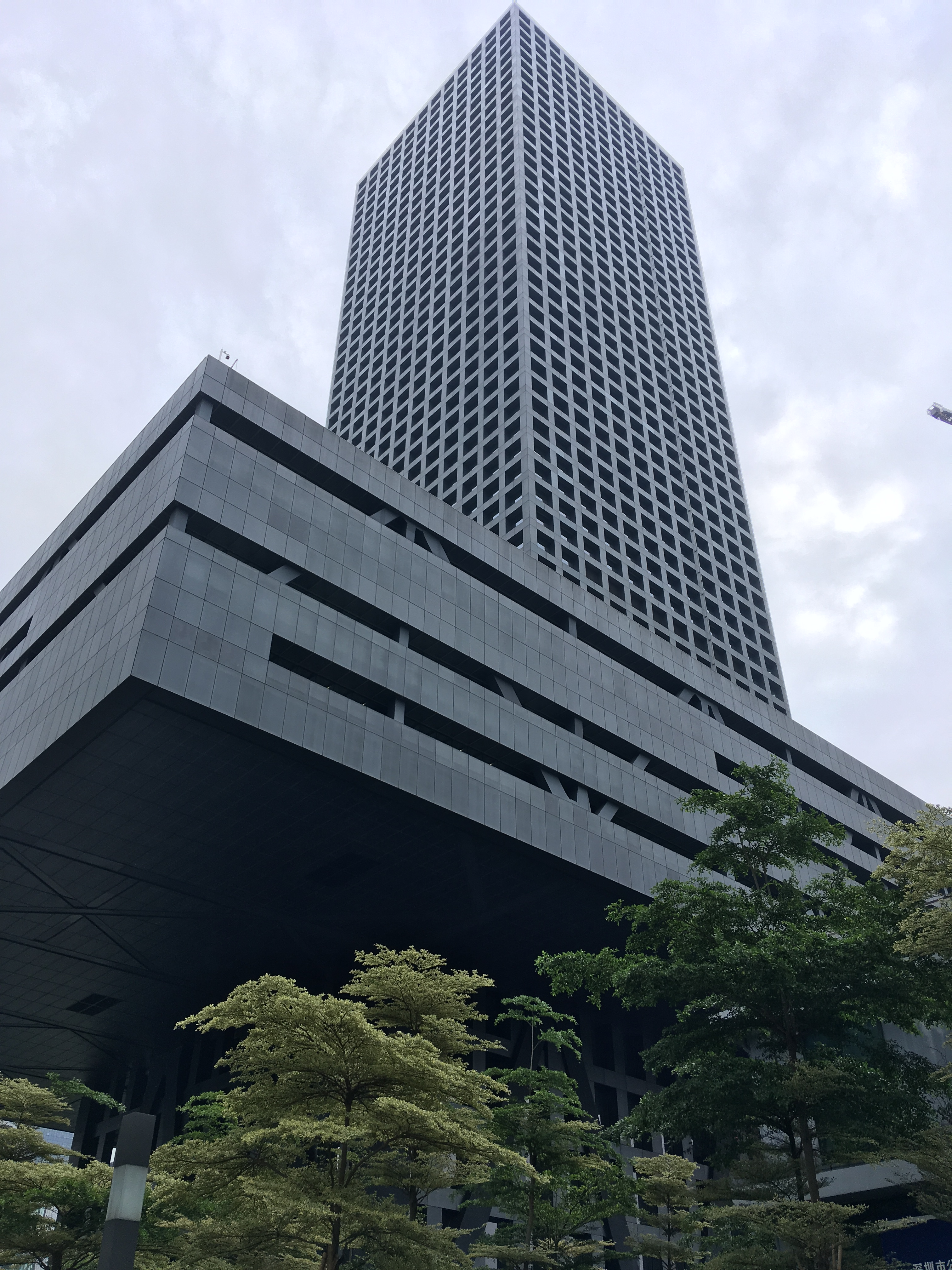 Shenzhen stock exchange 2018.